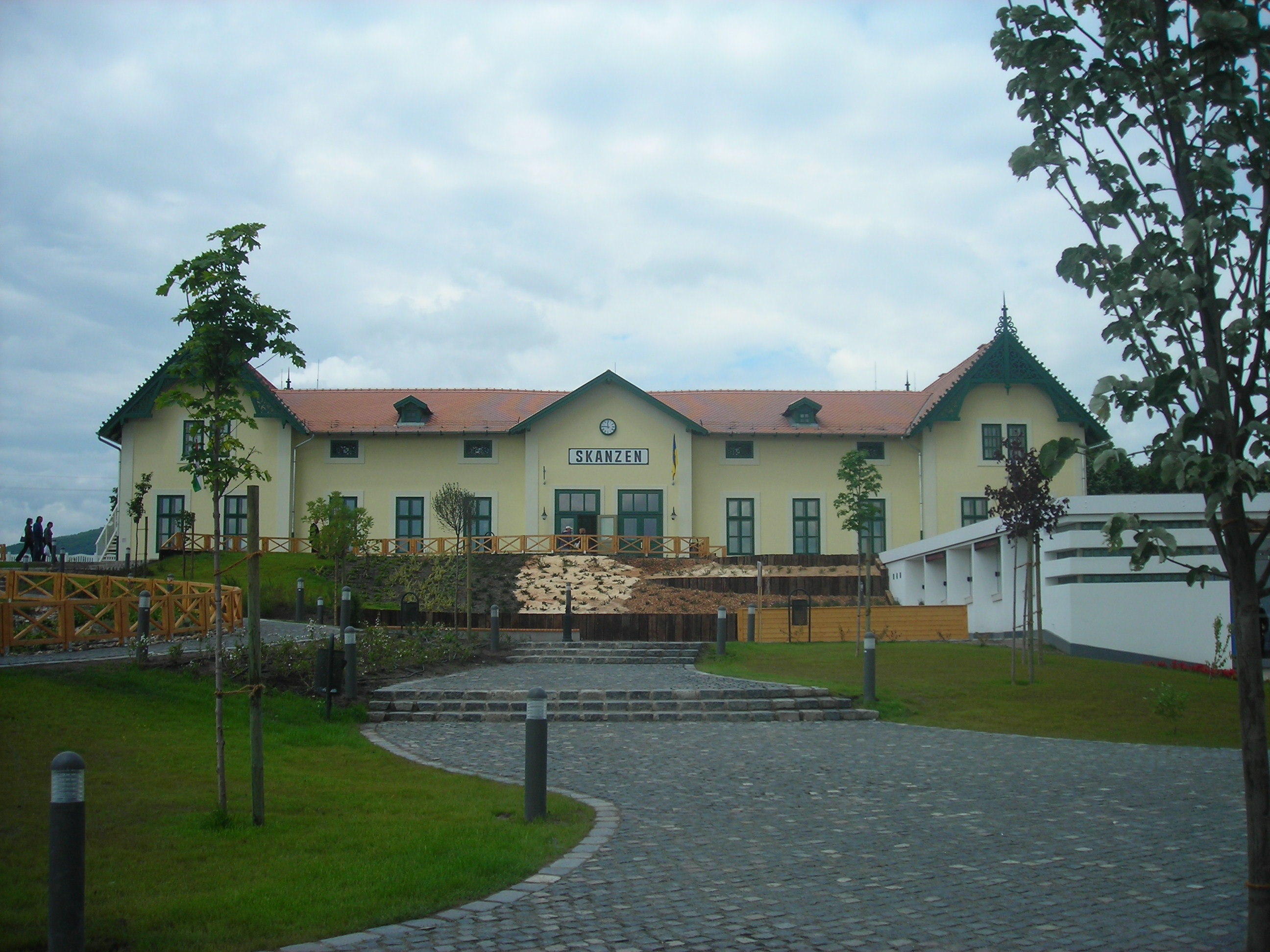 Szentendrei Szabadtéri Néprajzi Múzeum